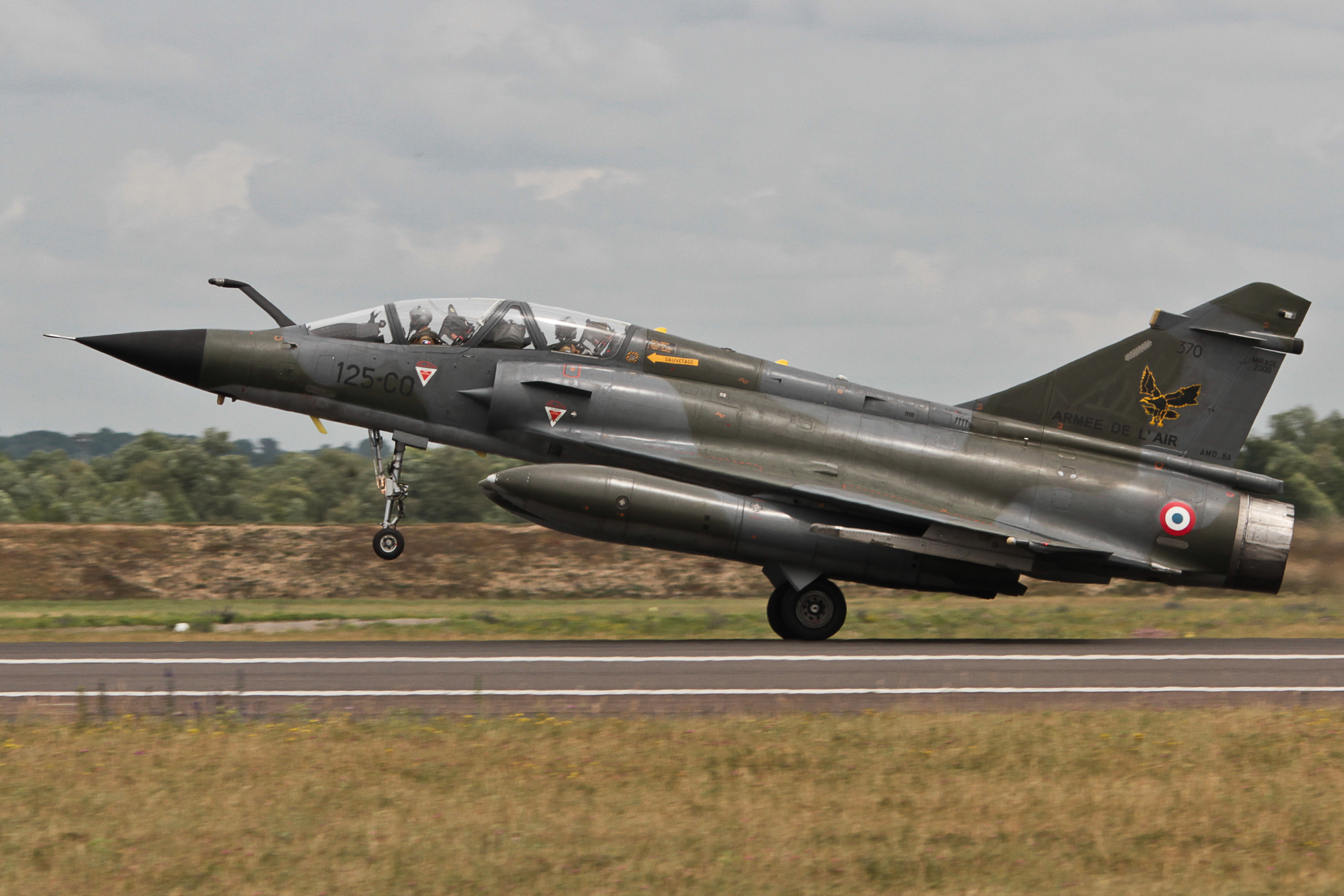 Mirage 2000N de l'Escadron de chasse 3/4 Limousin sur la BA113 de Saint Dizier le 17/06/2011